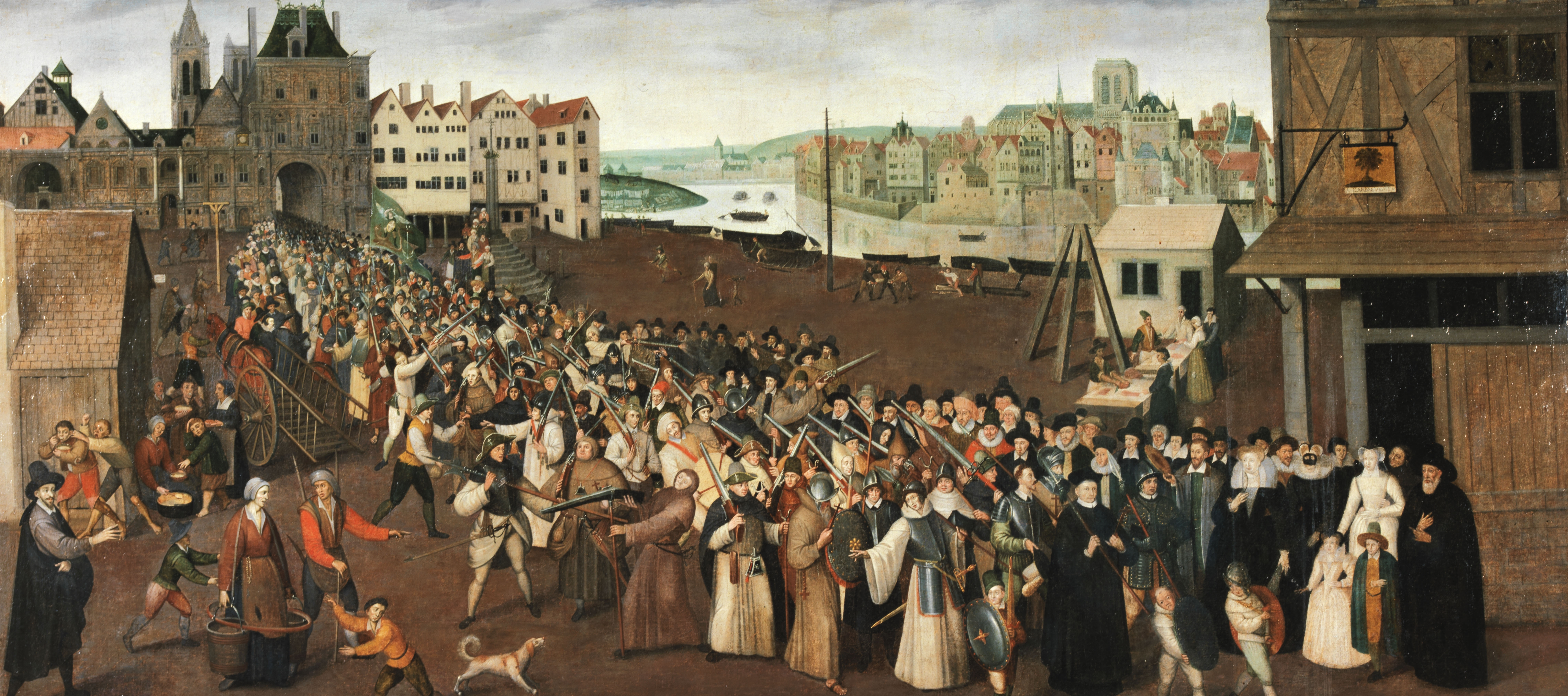 Procession de la Ligue sur la place de Grève.